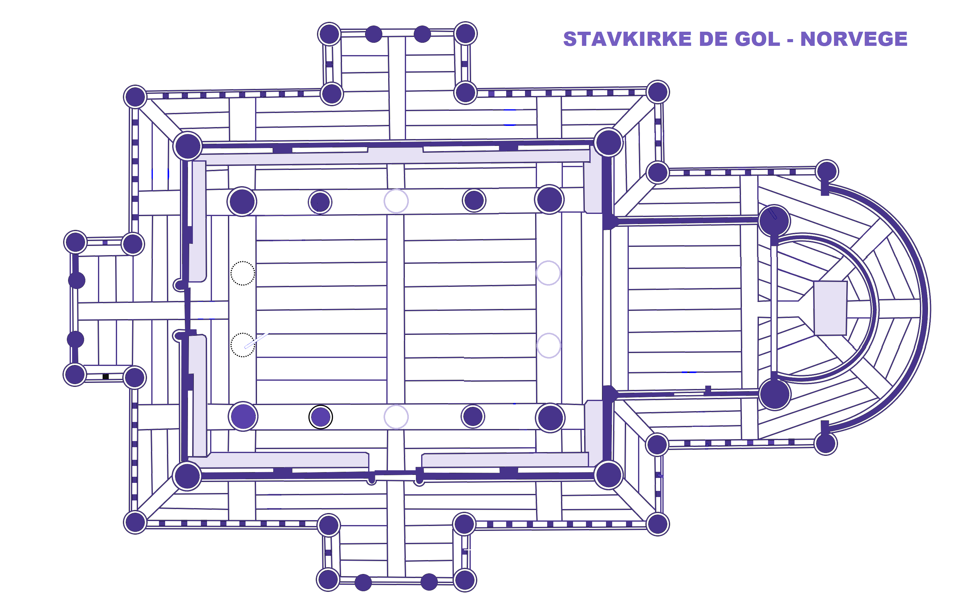 Stavkirke de Gol, Norvège, Plan (image Commons modifiée)